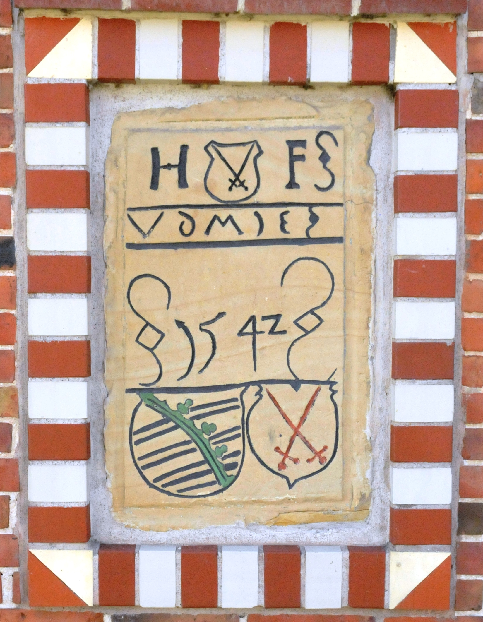 Molschleben, Inschrifttafel von 1542 am ehem. Neuenthor